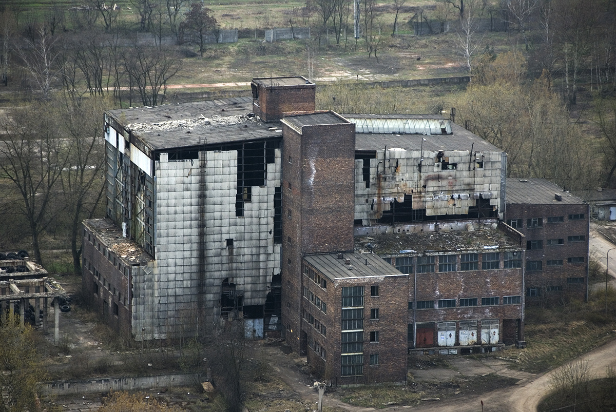 Nieistniejący budynek kotłowni Wistomu 2009